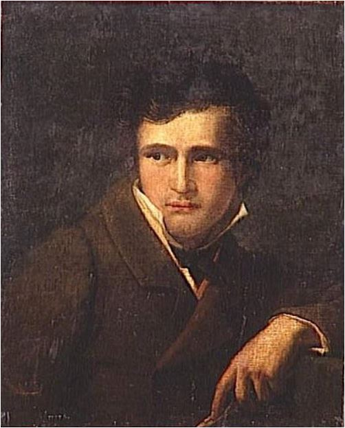 Portrait en buste d’un home de face